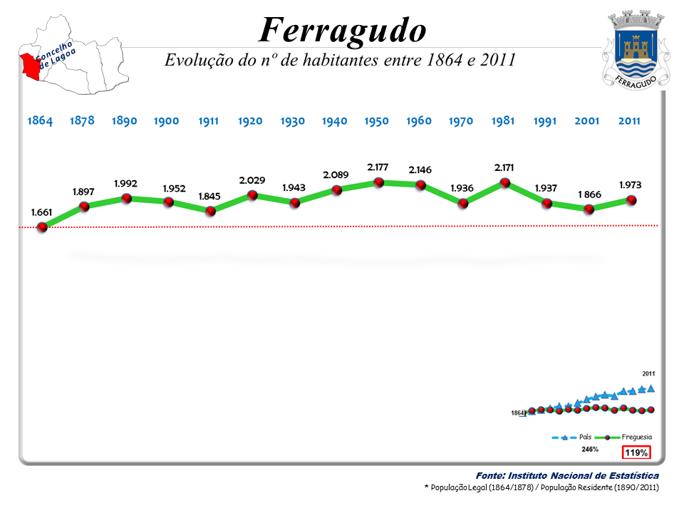 Censos 1864/2011